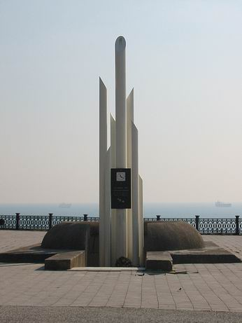 Памятный знак на мысе Дооб, Кабардинка, Россия